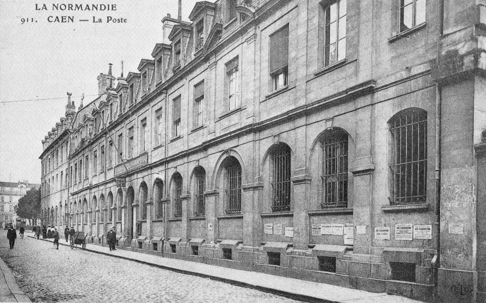 Hôtel des postes dans l'aile parallèle à la rue Jean Eudes de l'ancien séminaire des Eudistes de Caen